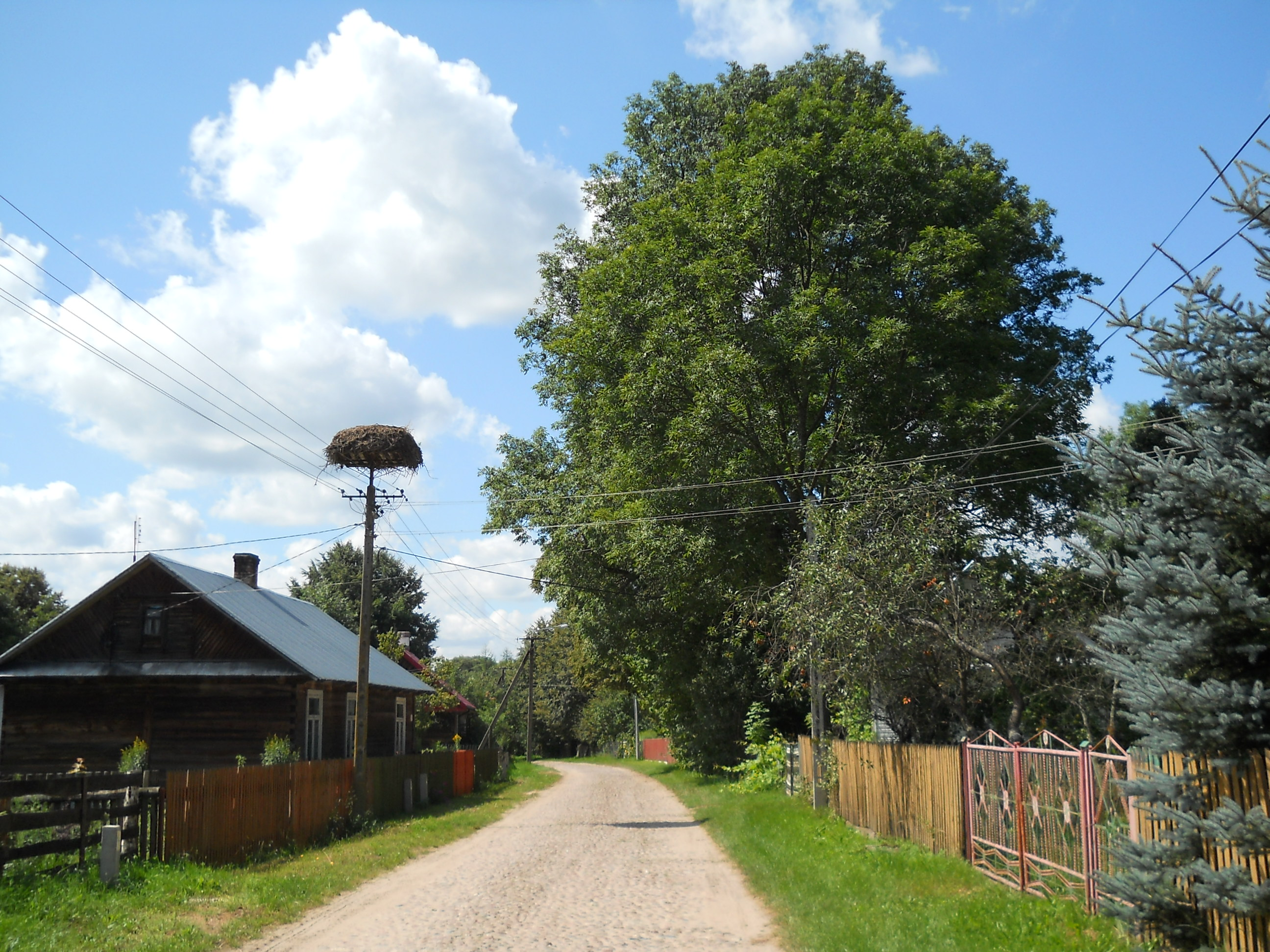 Puchły